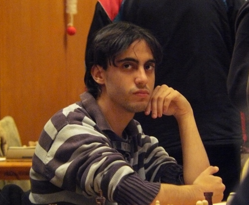 Bansko Open 2010